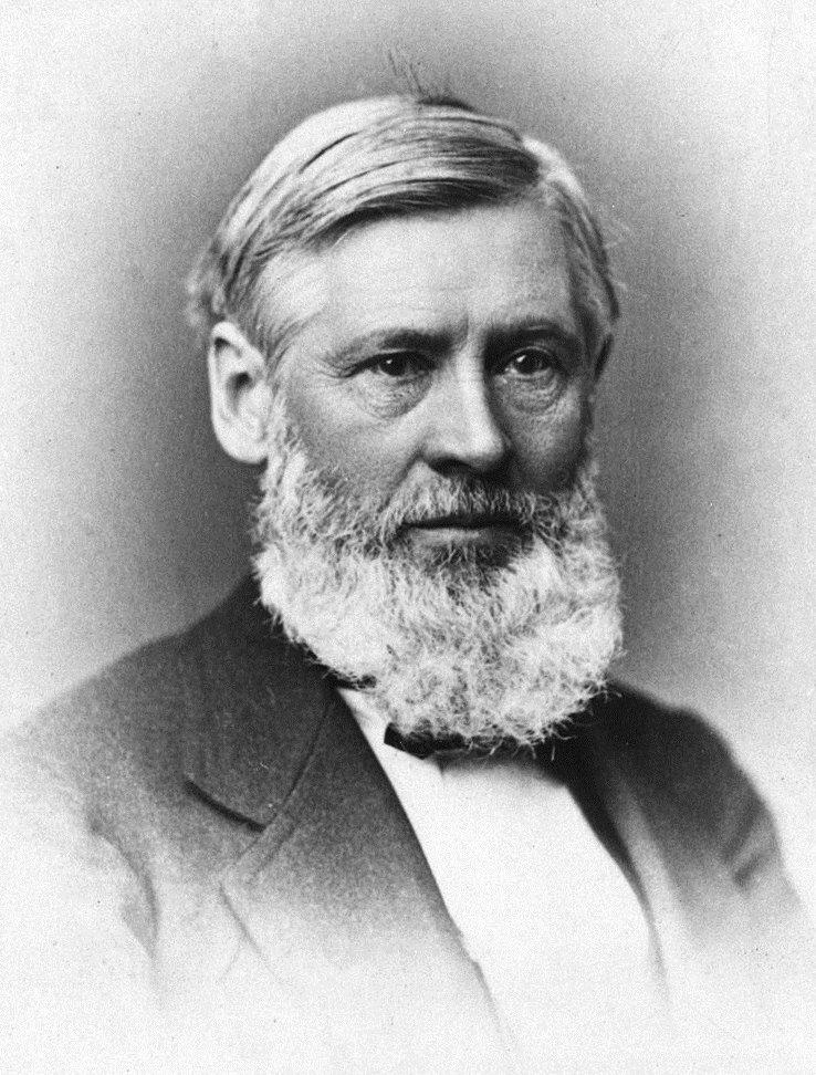 Asa Gray